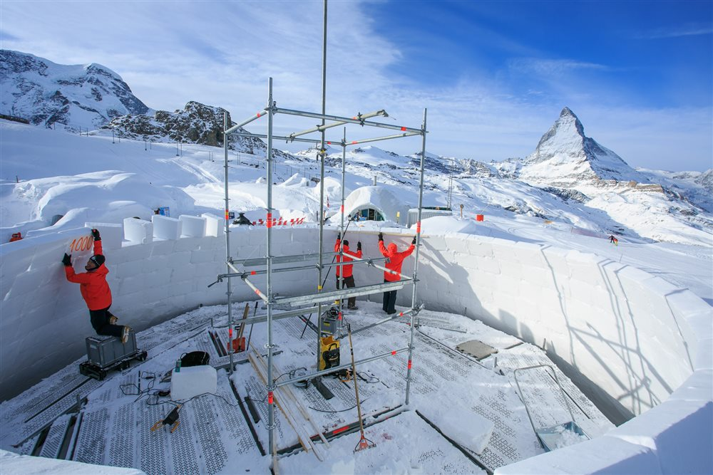 Iglu Weltrekord 2016 in Zermatt